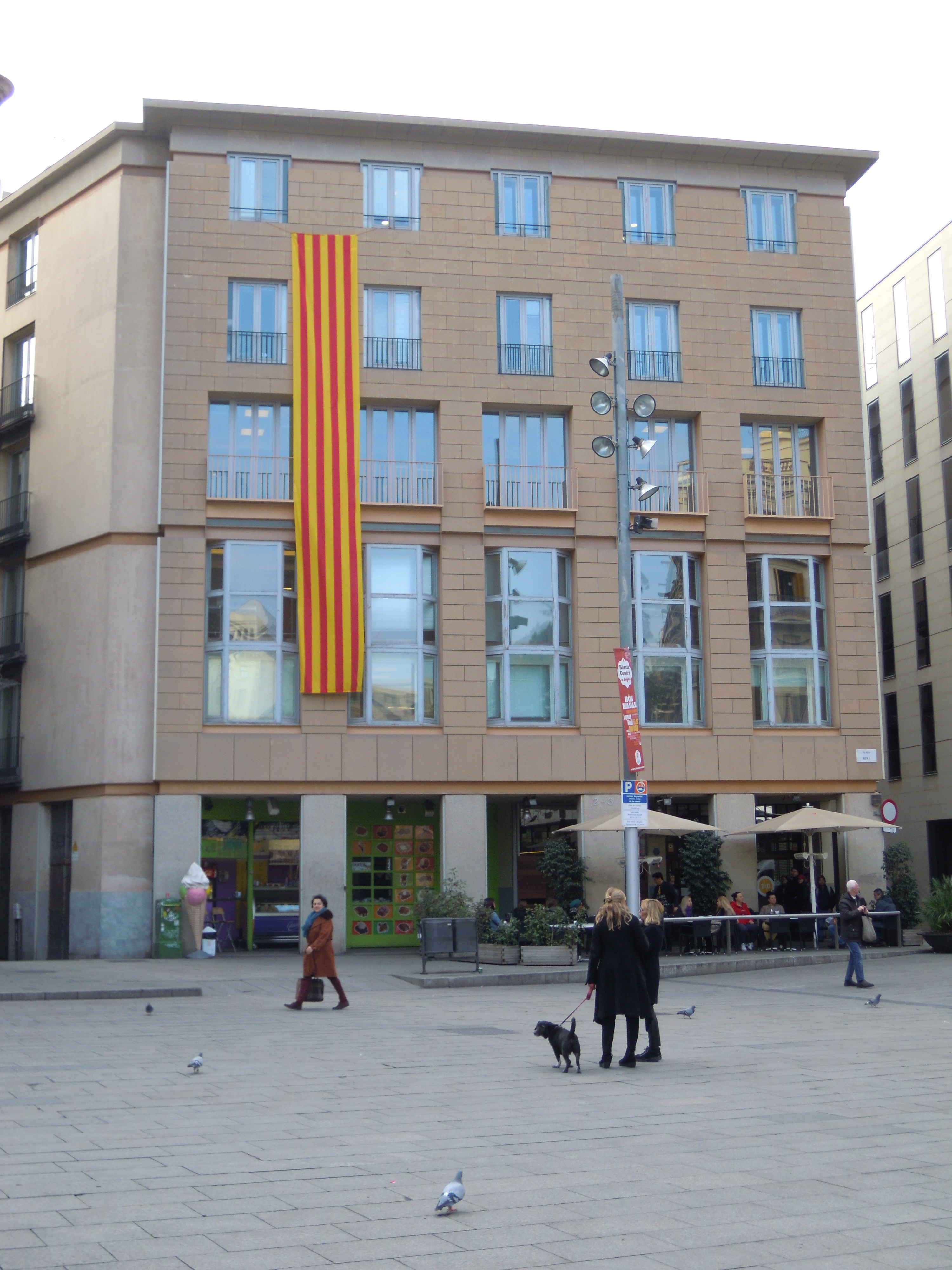 Plaça Nova, 2-3, Barcelona